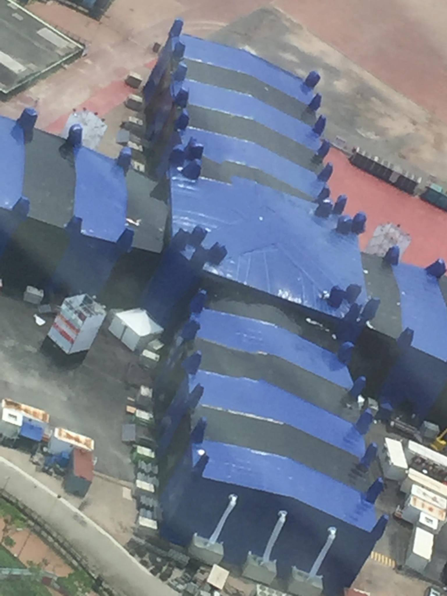 黎明Leon 30th Anniversary Random Love Songs 4D in Live 20160429